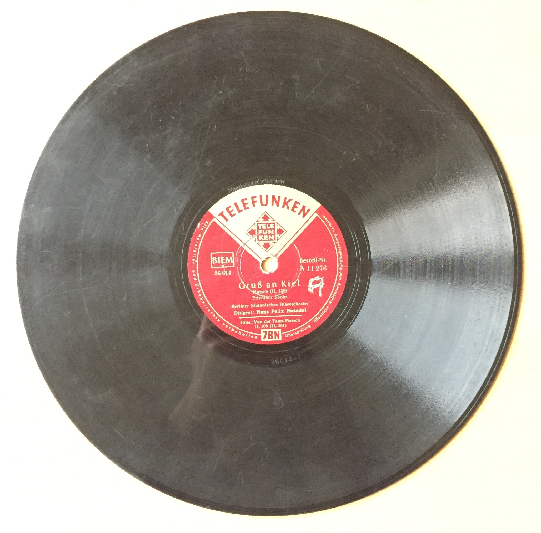 Schellack-Platte "Gruß an Kiel"